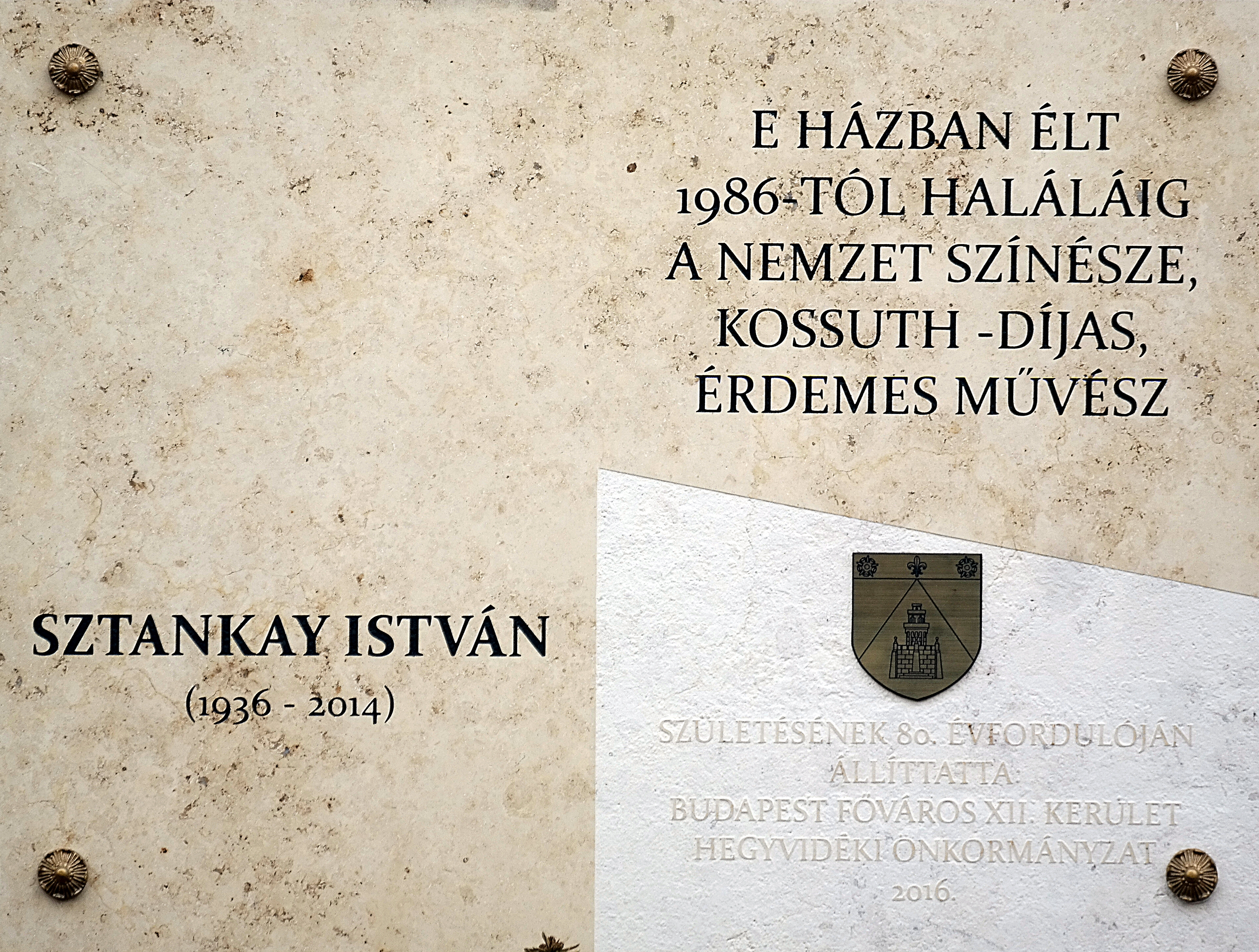 Sztankay István emléktáblája (Budapest, XII. ker., Városmajor utca 10.)